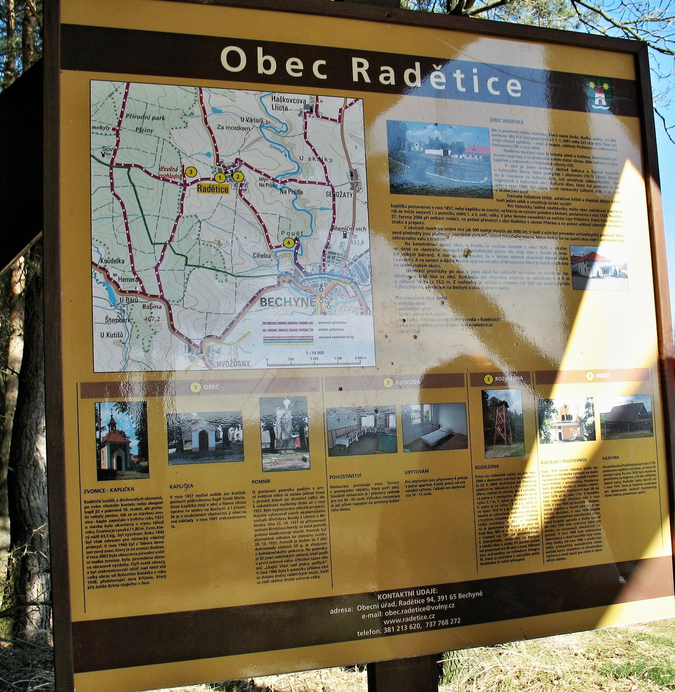 Rozhledna u obce Radětice nedaleko Bechyně (okres Tábor). Informační tabule u rozhledny.